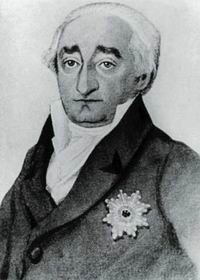 Karl Freiherr vom und zum Stein